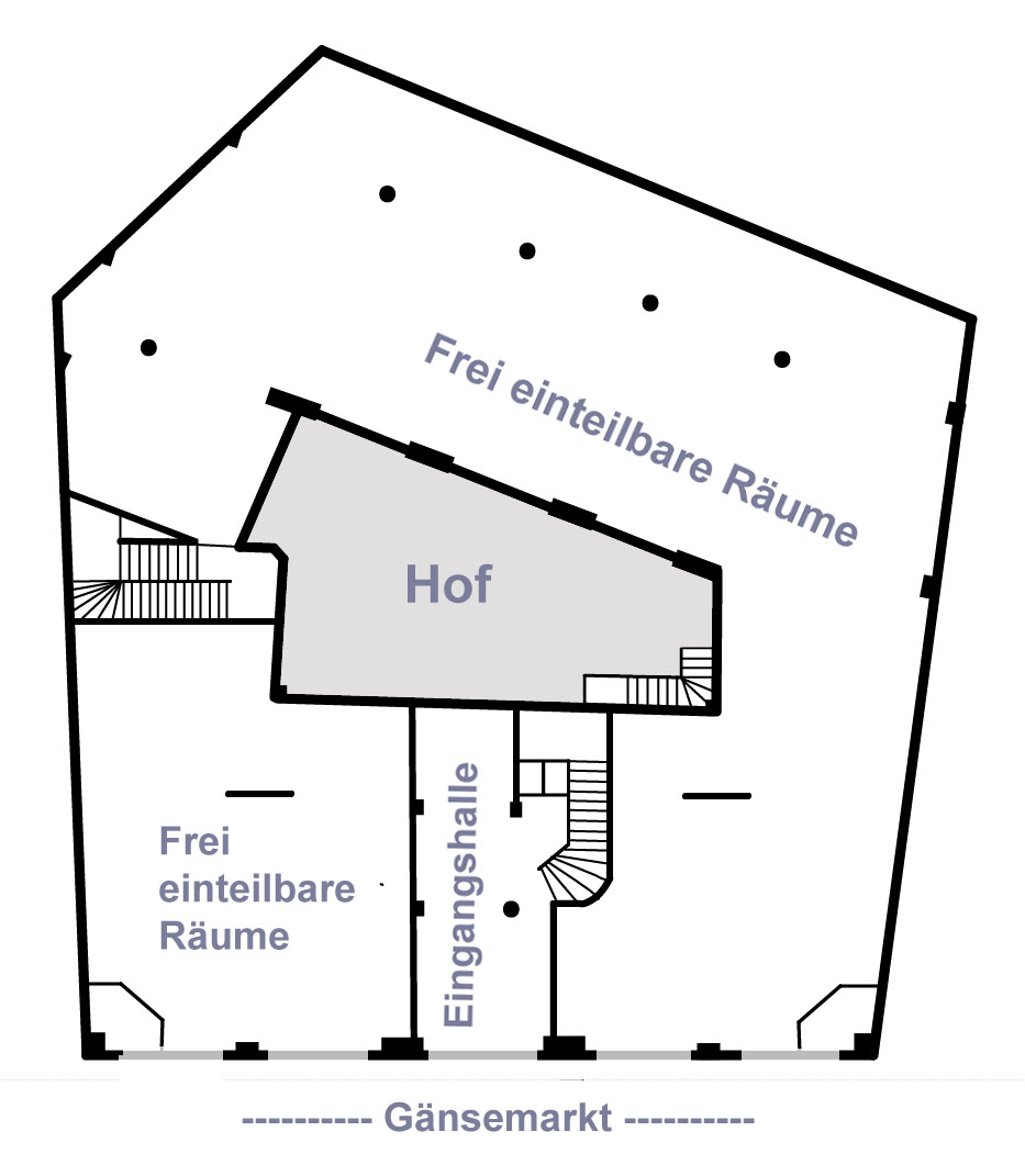 Hamburg-Neustadt, Girardethaus , Grundriss This is a photograph of an architectural monument.